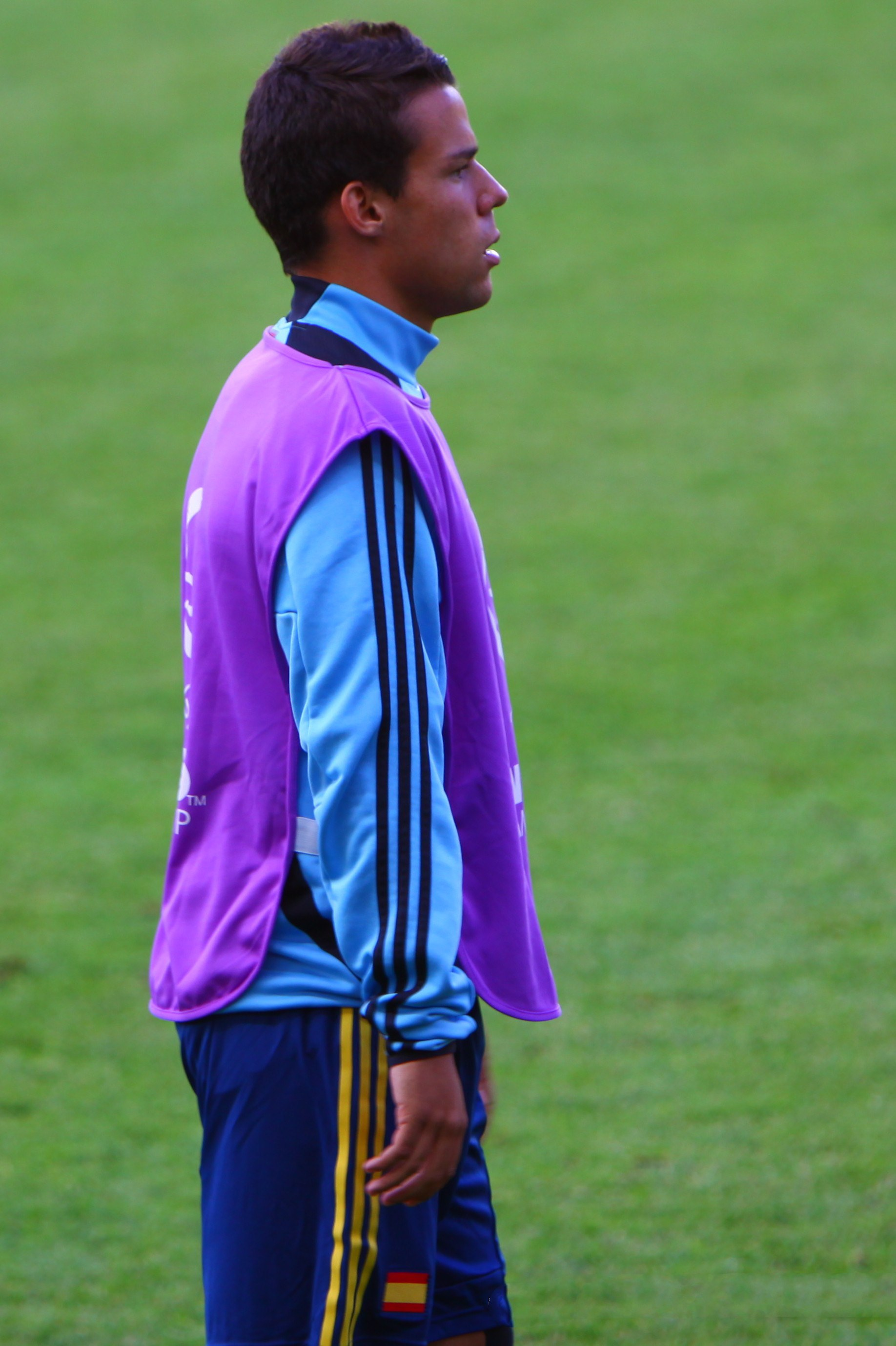 U-19 Portugal vs Spain.